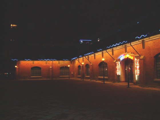 中文（台灣）: 西門紅樓十字建築與其廣場夜景。